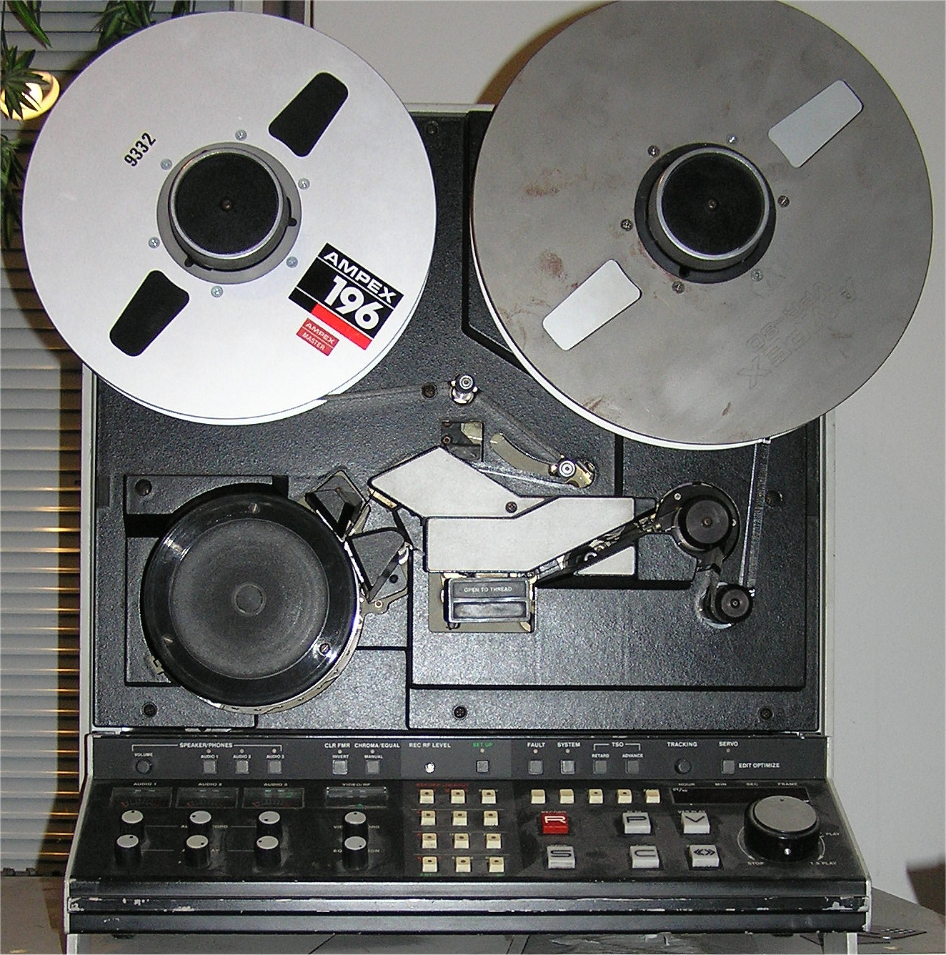 Kuva: Broken Halonen Productions